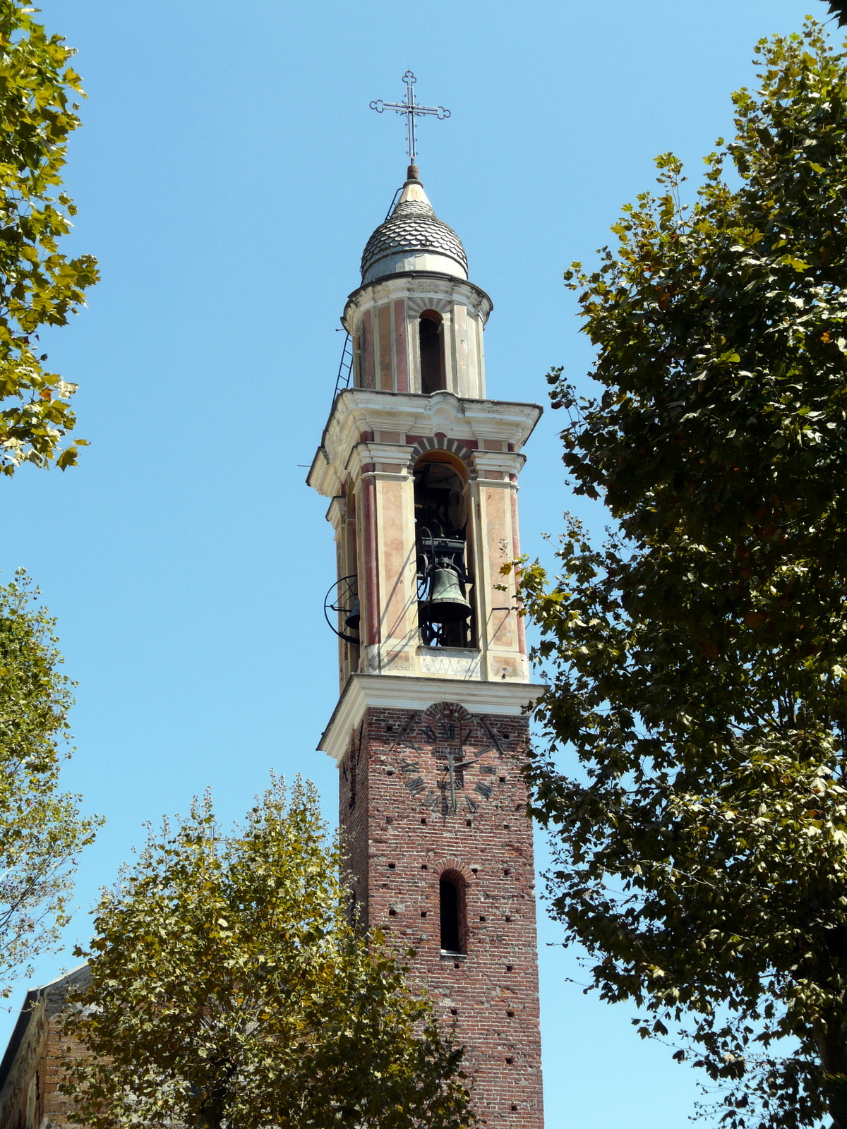 Il campanile della pieve di Sant'Ambrogio, Uscio, Liguria, Italia